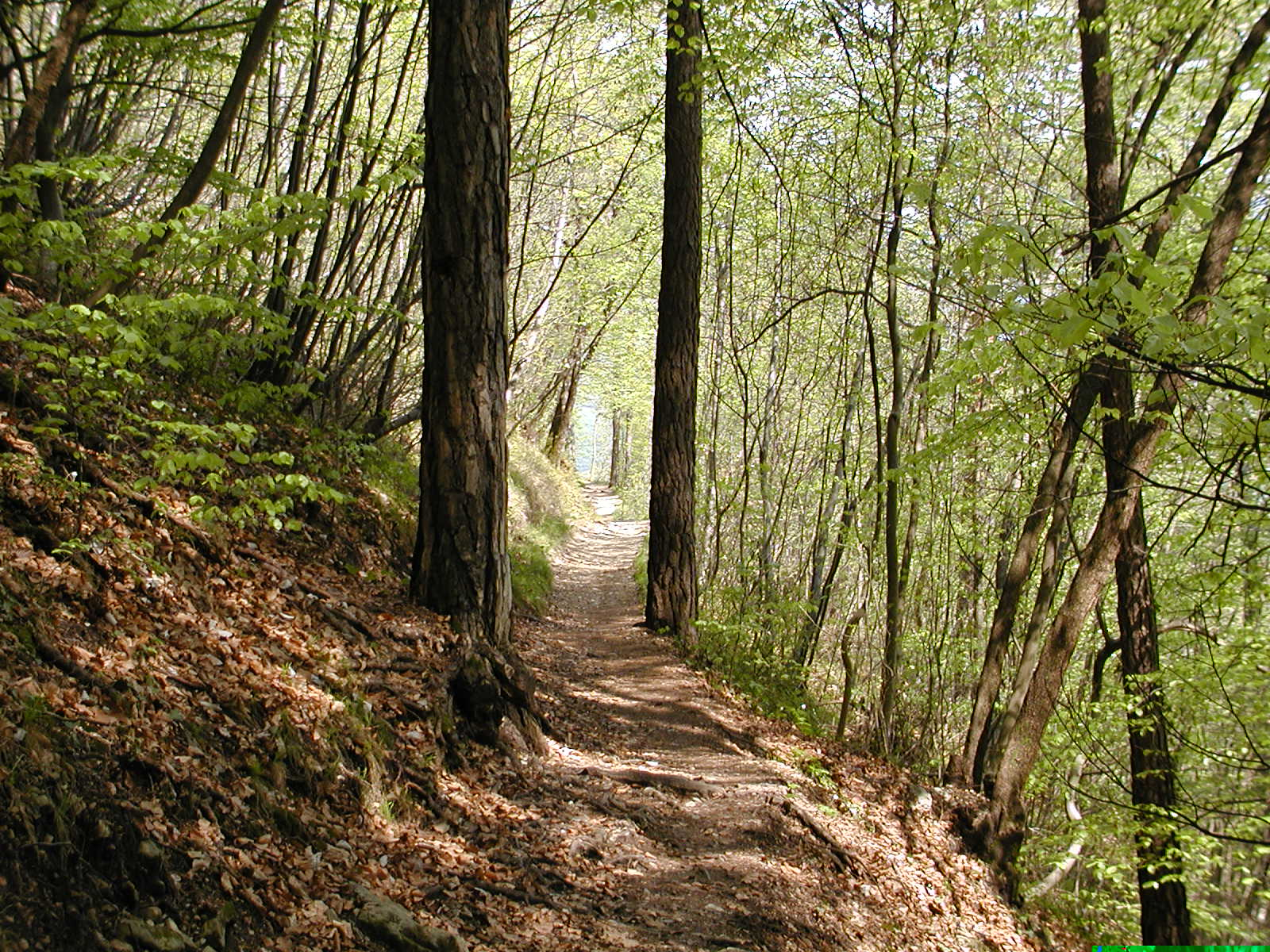 Wald in Altenburg (bei Kaltern), Südtirol, Italien